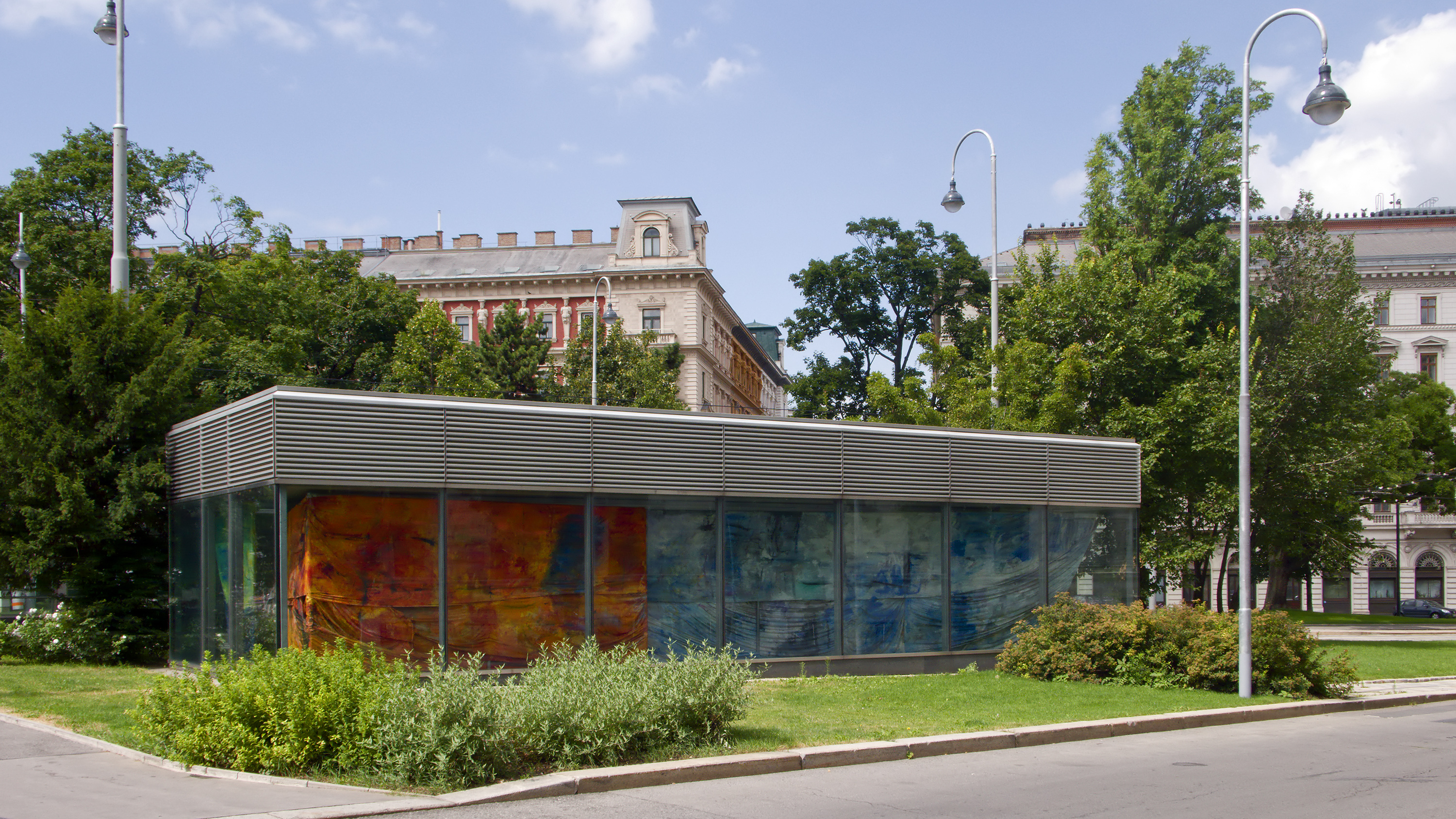 Ehemalige U-Bahn-Station Lerchenfelder Straße, Wien